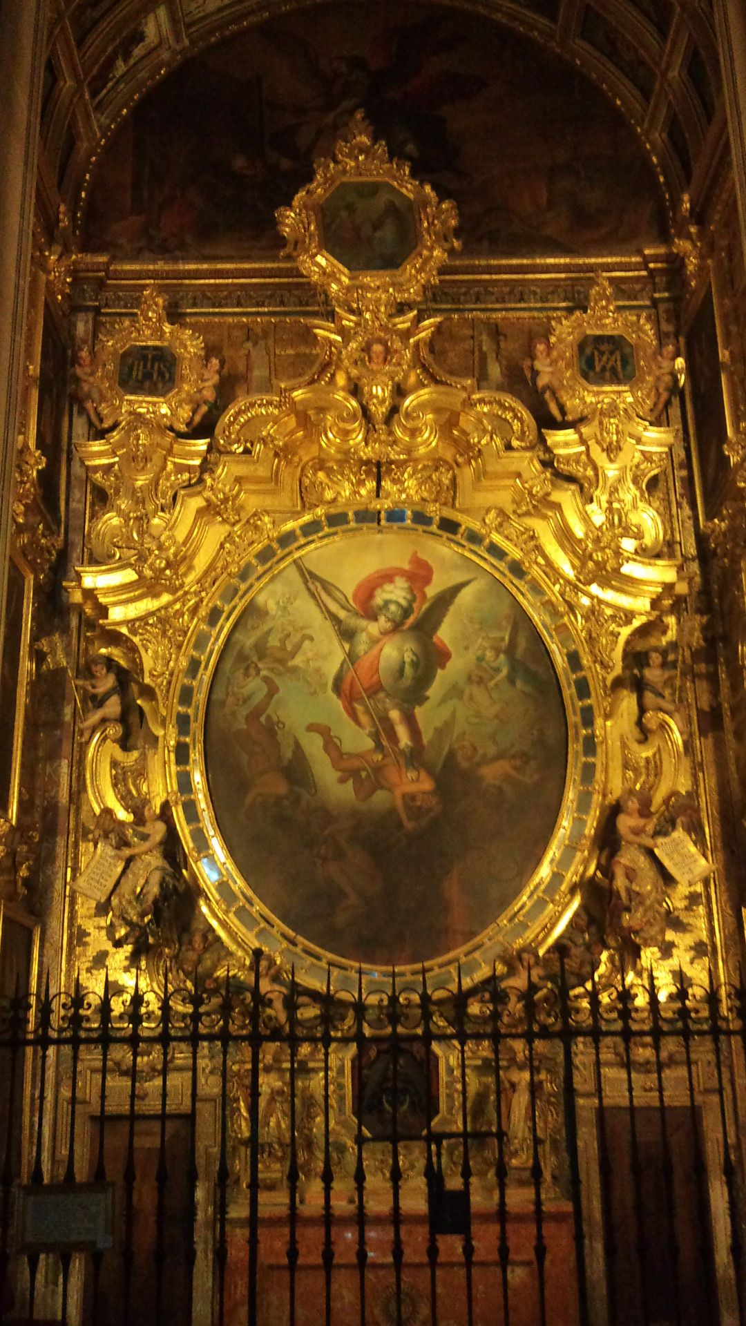 Capilla de San Miguel de la Catedral de Jaén. Se observa el retablo barroco.